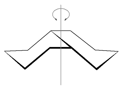 jeden konformer dekalinu - šedivě vyznačena dvojčetná osa symetrie